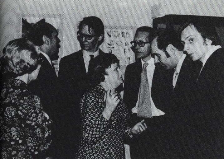 W.Sarnowska wsrod uczestnikow wystawy Odkrycia archeoloigczne na Opolszczyznie '77